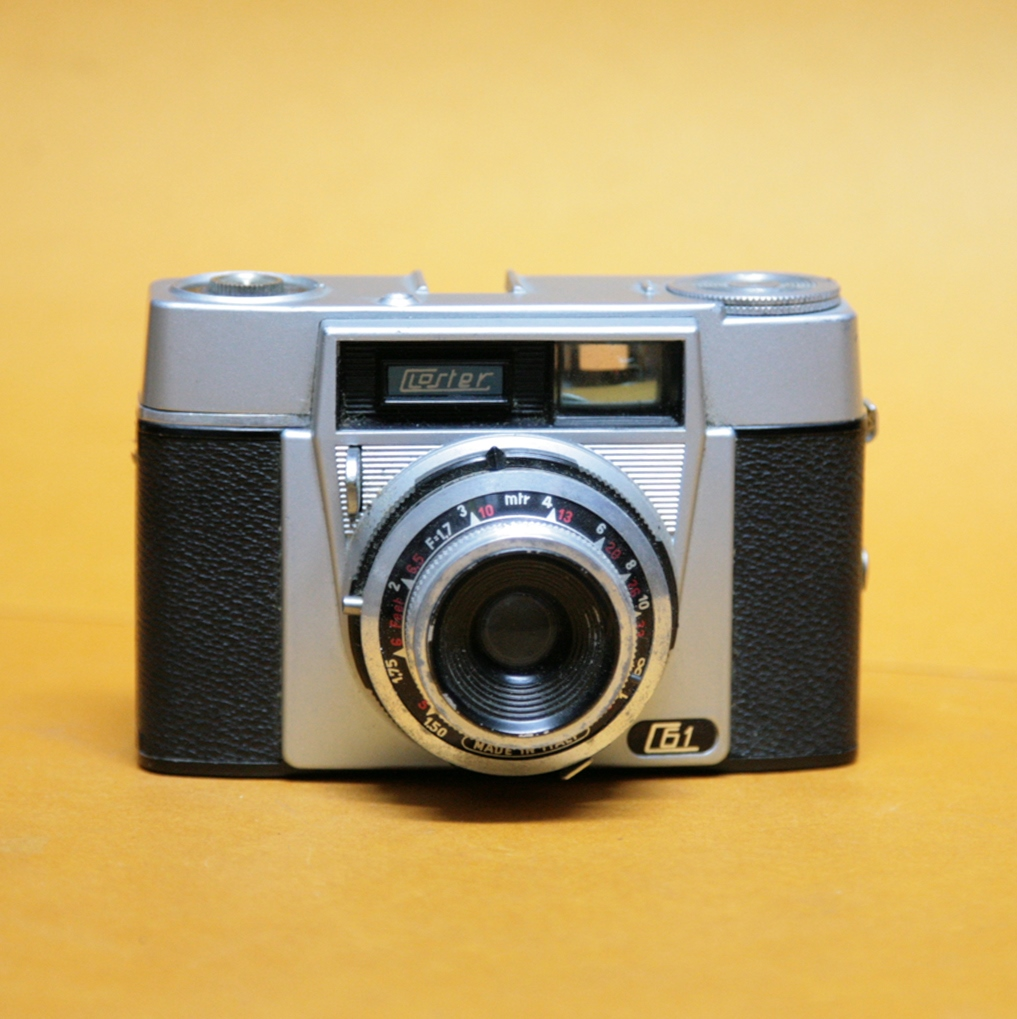 Coll. Marcè CL - Closter 61 princess a telemetro del 1950 fabbricata in Italia Lente "OPTISCHER WERK LAMBRON ACHROMATISCH" 50mm con apertura max f/7 tempi di posa: 1/30sec.;1/75sec.; 1/150sec.; B. Due aperture diaframma: Sole; Cielo coperto. Messa a fuoco da 1m a infinito. Attacco Sincro flash. Usa pellicola 35mm